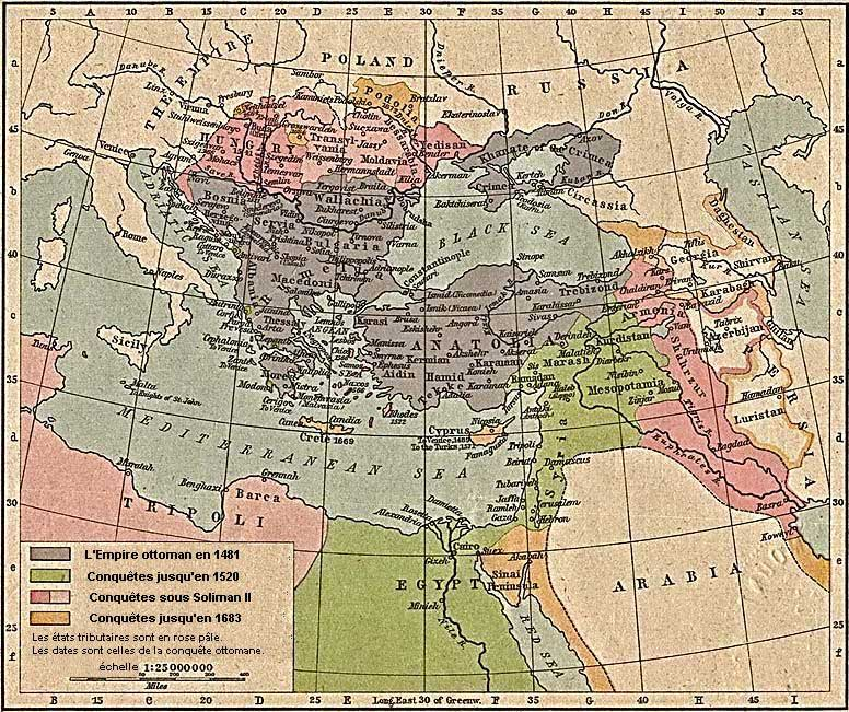 Carte de l'Empire ottoman (ne différencie pas l'Empire lui-même des états vassaux)